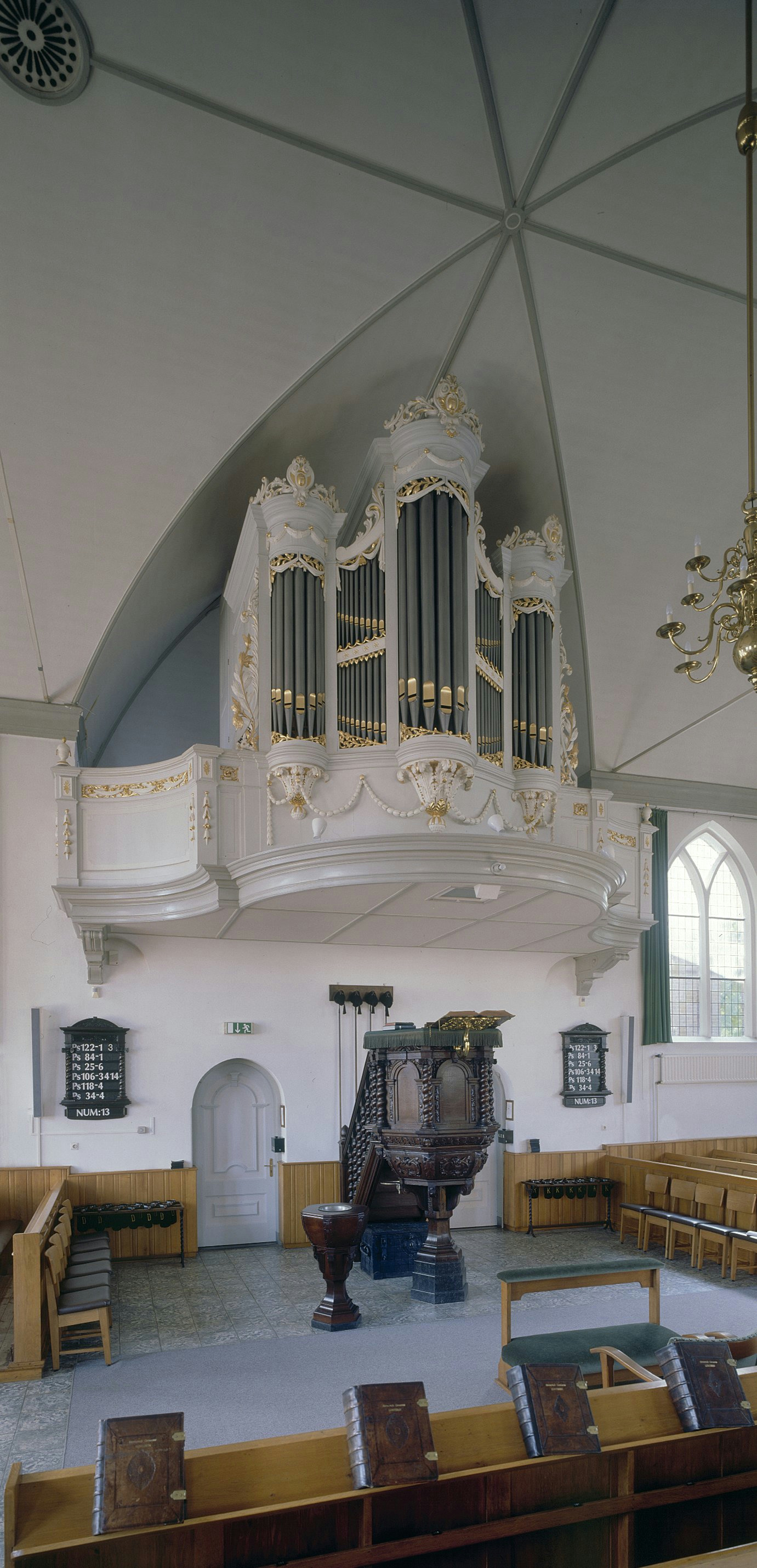 Nederlands Hervormde Kerk: Interieur, overzicht van de preekstoel en het orgel (opmerking: Gefotografeerd voor Het Historische Orgel in Nederland)